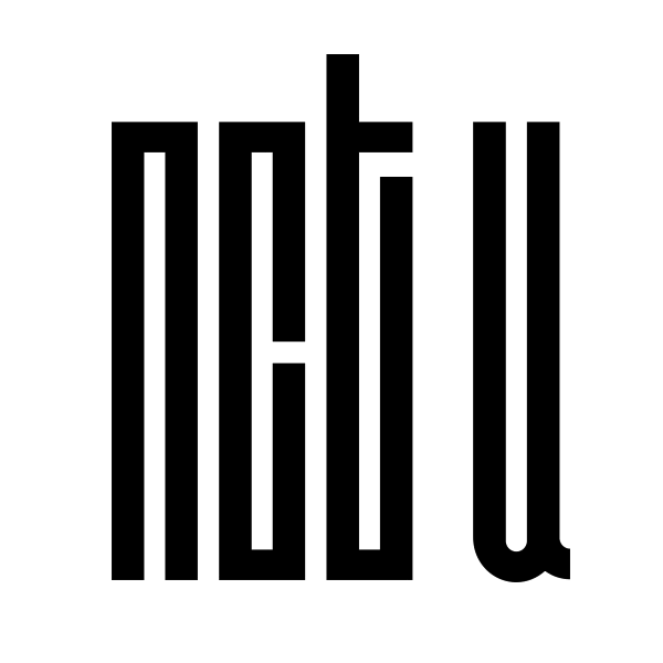 Logo de NCT U